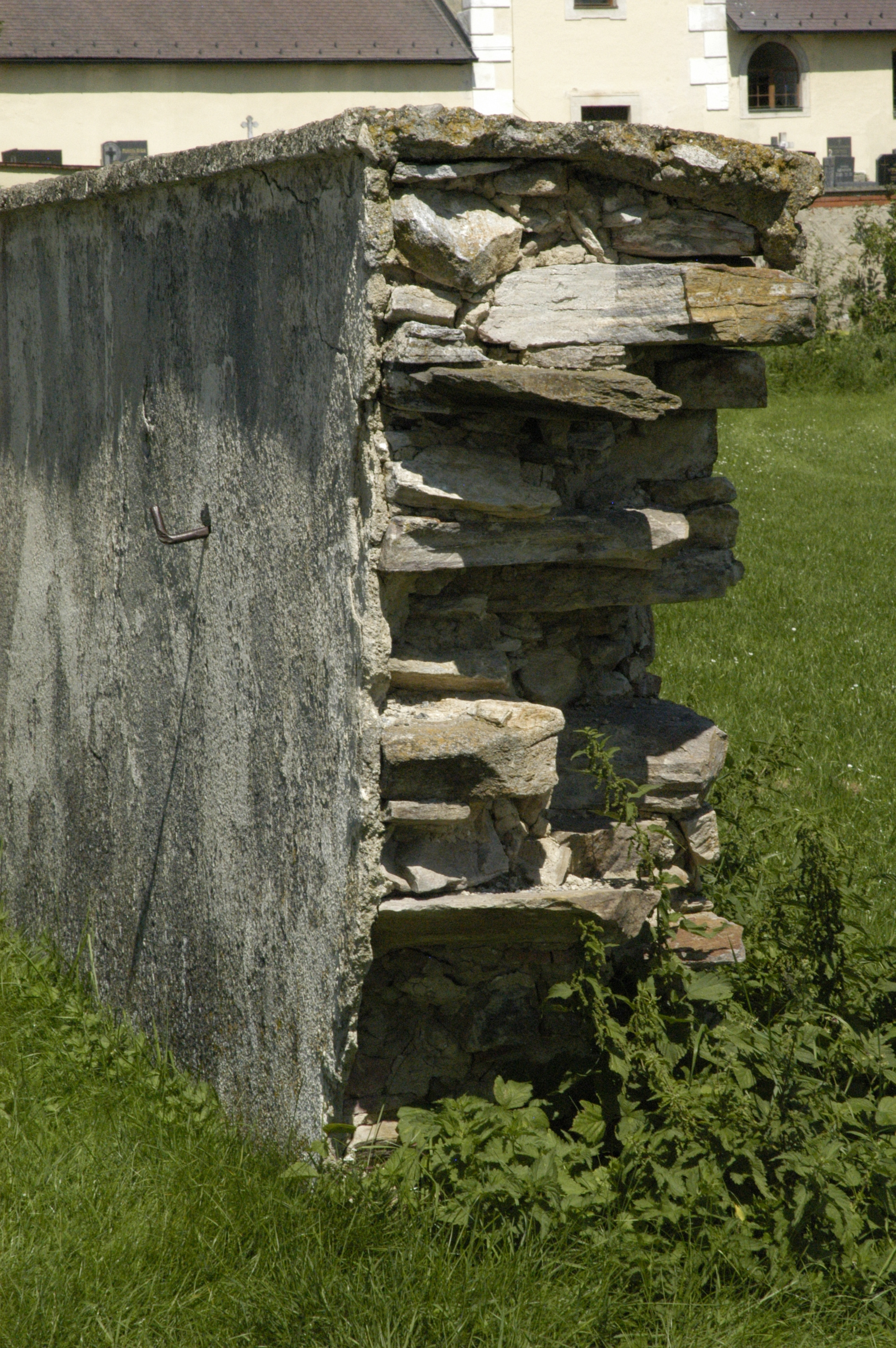 Bruchsteinmauer in Röhrenbach